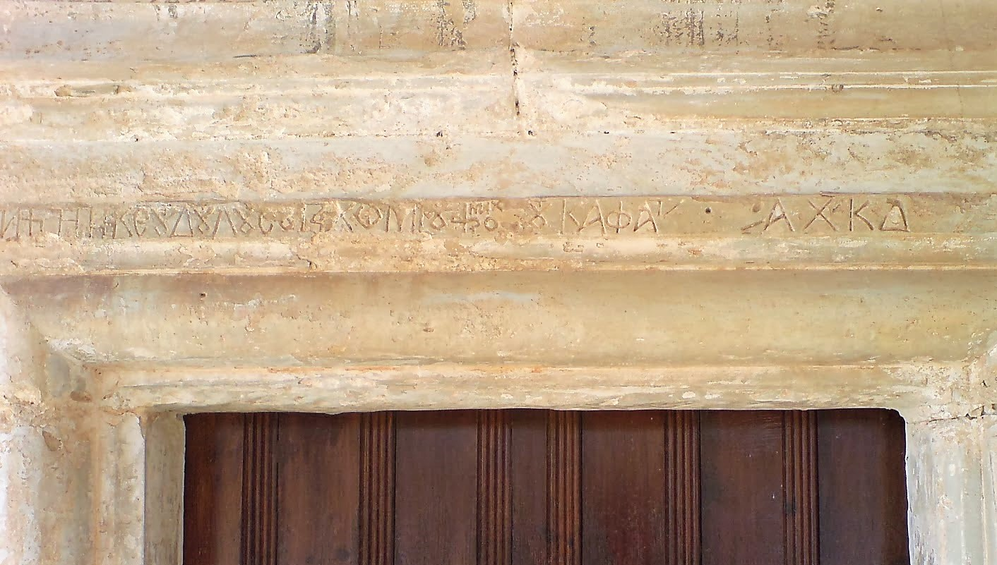 Μονή Βατέ: Η επιγραφή του υπερθύρου (ΑΧΚΔ = 1624)